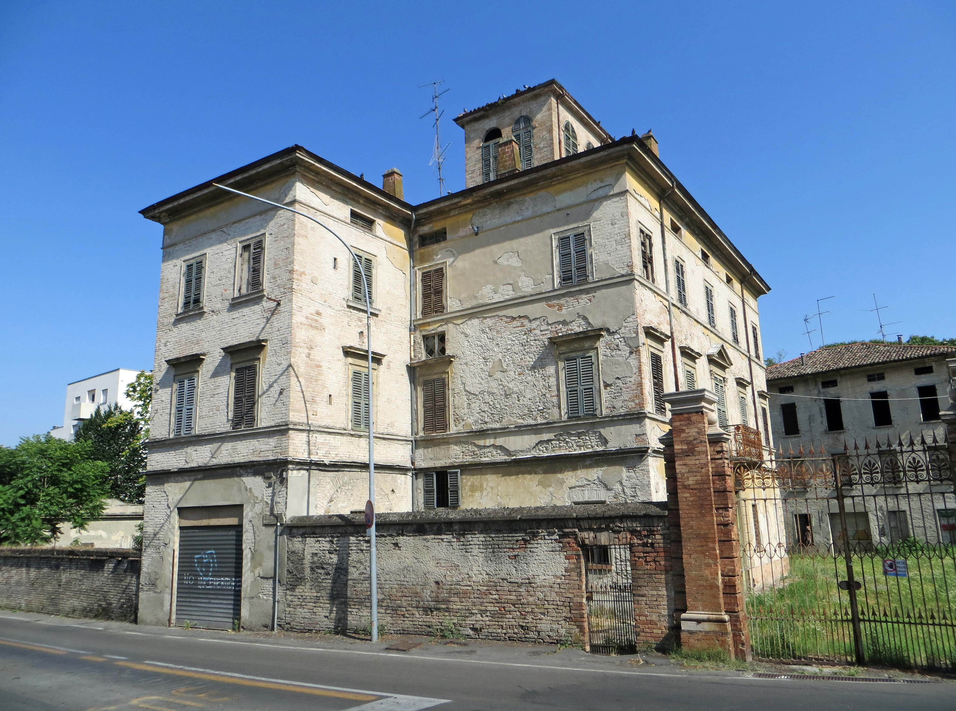 Villa Picedi (Parma) - facciata e lato nord